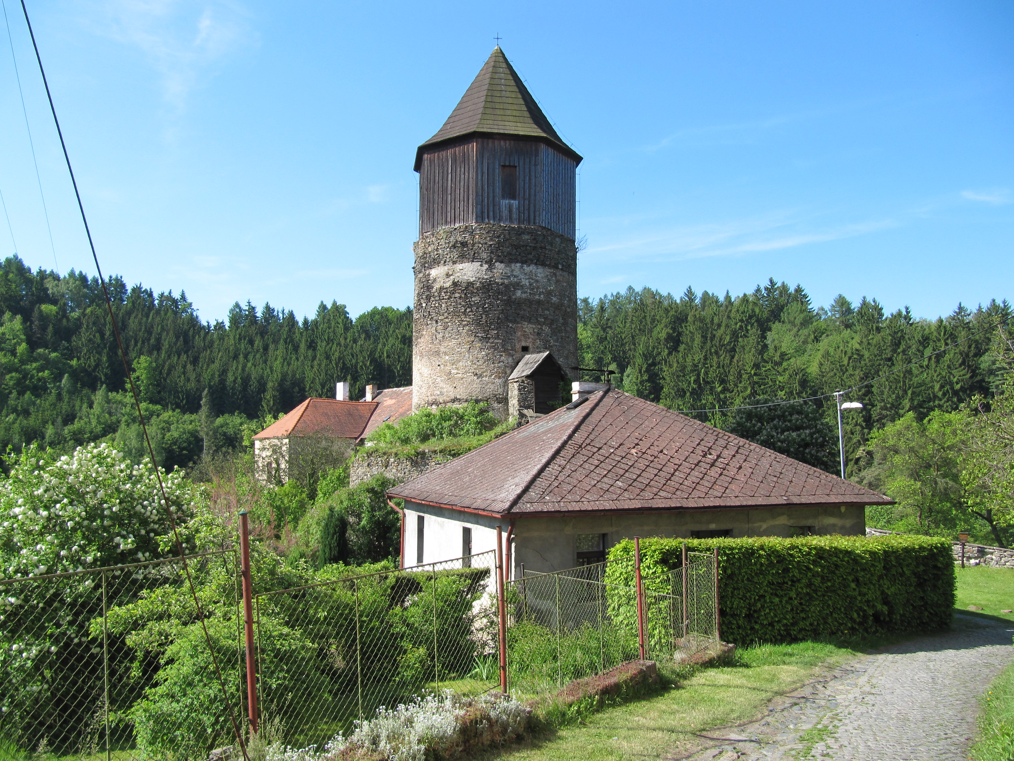 Pirkštejn